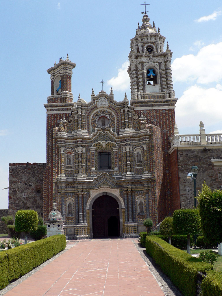 Fachada del templo de San Francisco Acatepec, en Puebla (México)